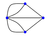 Karaliaučiaus tiltai